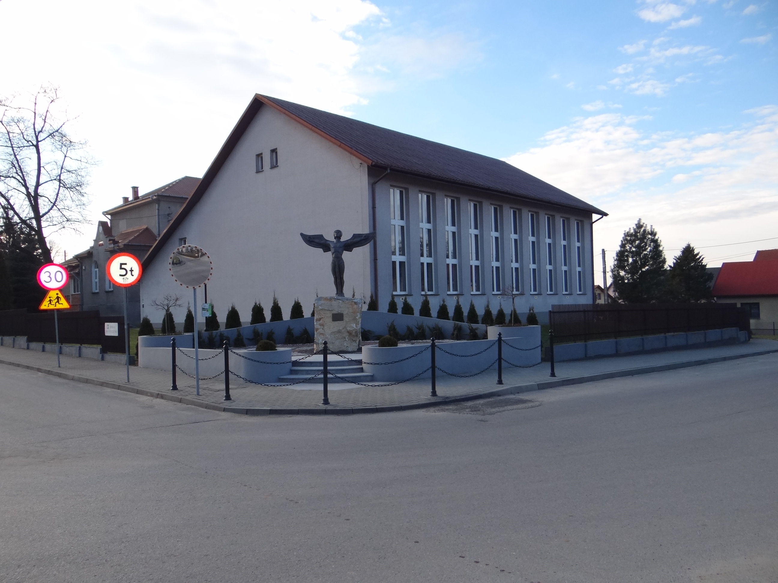 Odporyszów